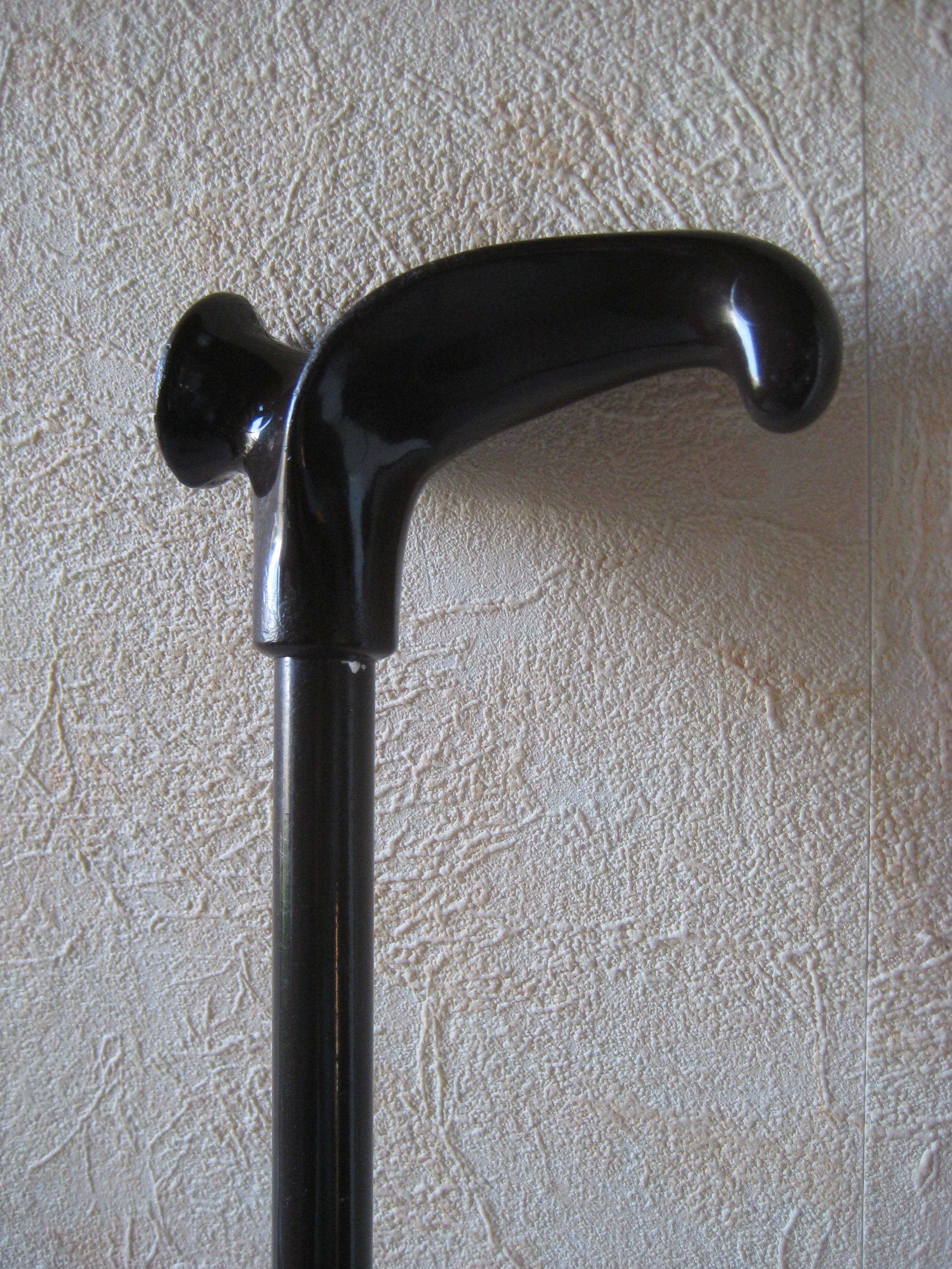 Gehhilfe mit anatomisch geformtem Handgriff